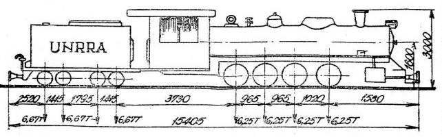 UNRRA-Lokomotiven 1-34 der Jugoslawische Staatsbahnen (JDŽ): Typenskizze